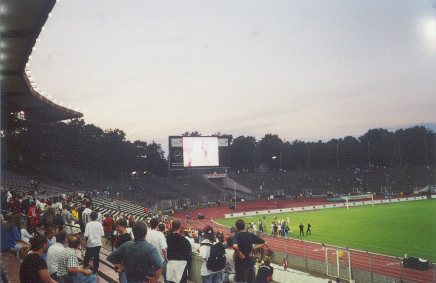 German 2. Bundesliga match Eintracht Frankfurt – Arminia Bielefeld (0:2), September 19th, 2001